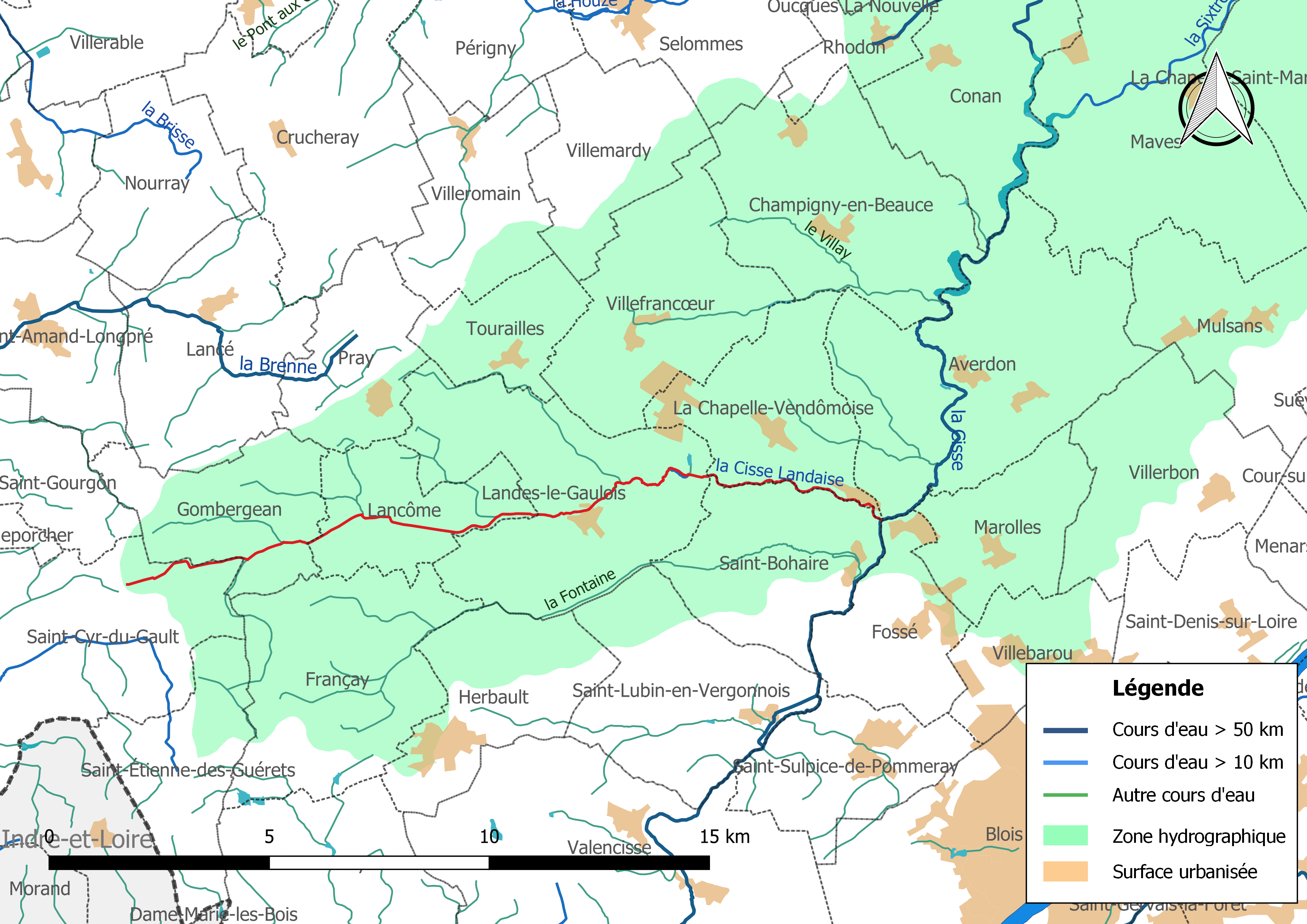 Carte du cours d'eau « la Cisse landaise » et de son bassin versant (zone hydrographique dans laquelle il s'insère).